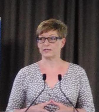 Kirsi Pimiä, 2016